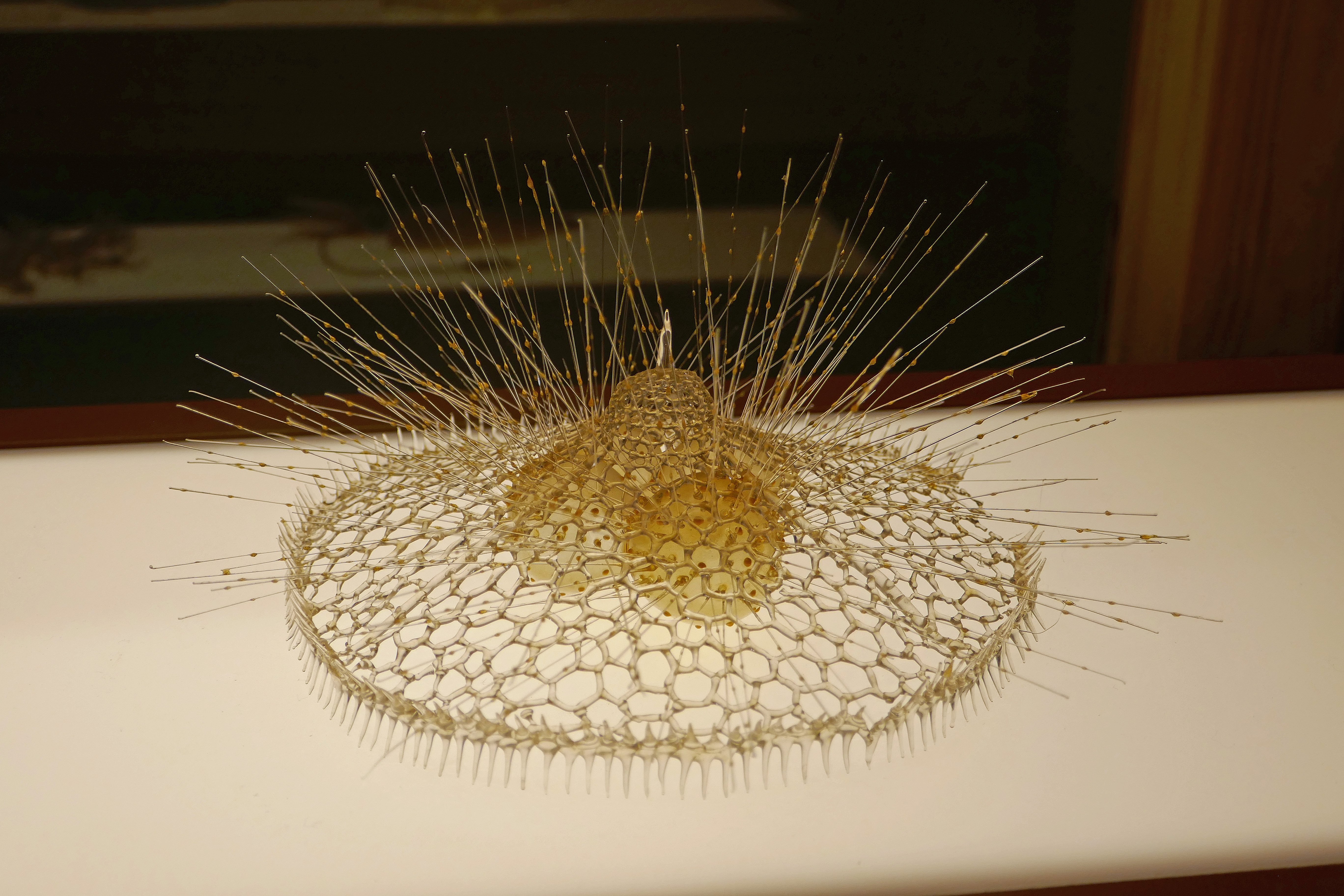 Leopold et Rudolf Blaschka. Lampromitra schultzei. Modèle en verre. Collection du Musée zoologique de Strasbourg. Exposition Laboratoire d'Europe Strasbourg, 1880-1930 au Musée d'art moderne et contemporain de Strasbourg.